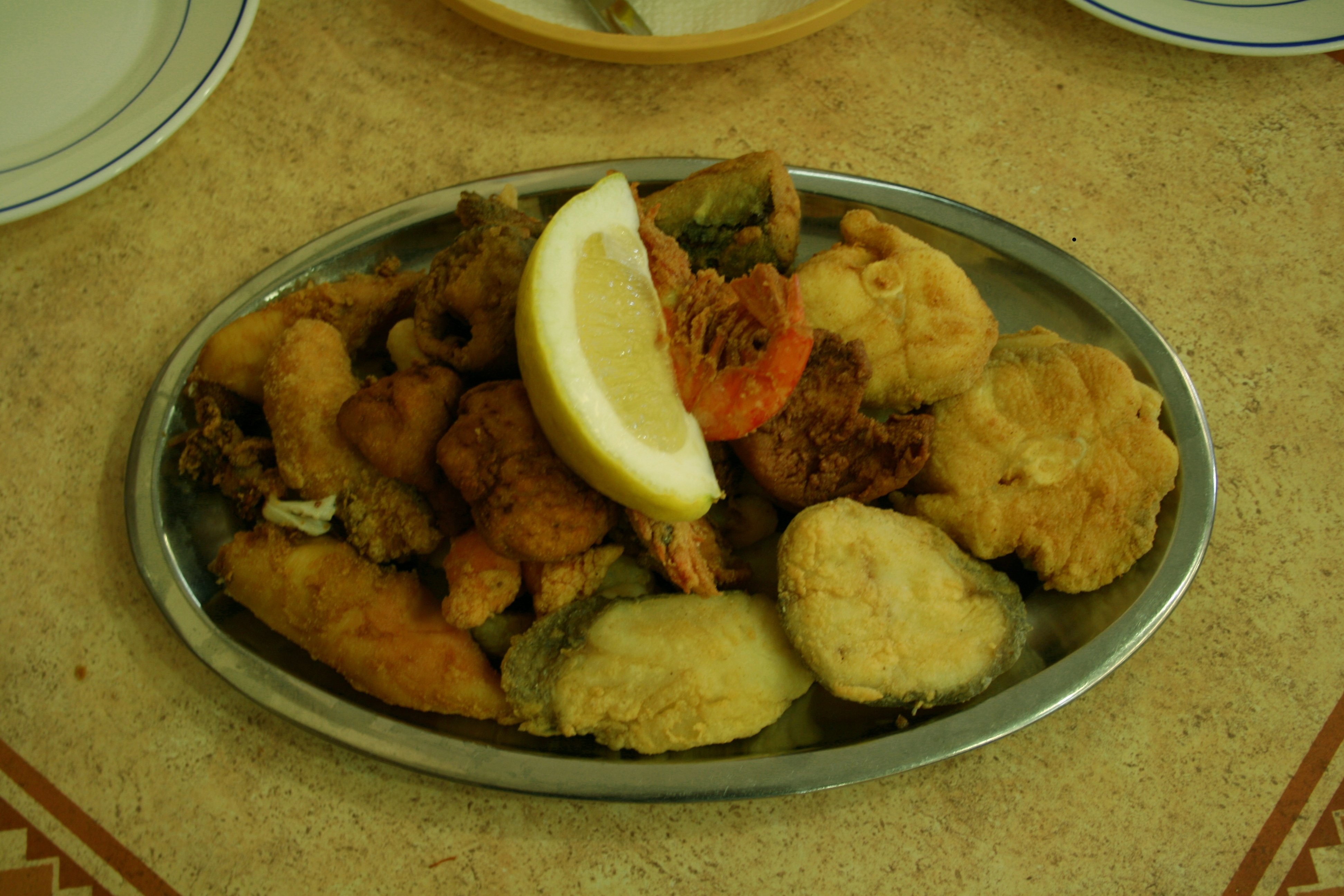 Pescaito frito - Cádiz